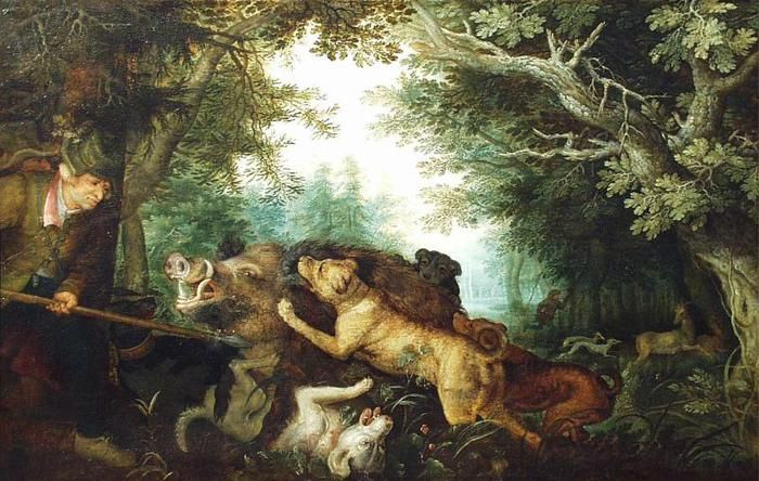 Everjacht